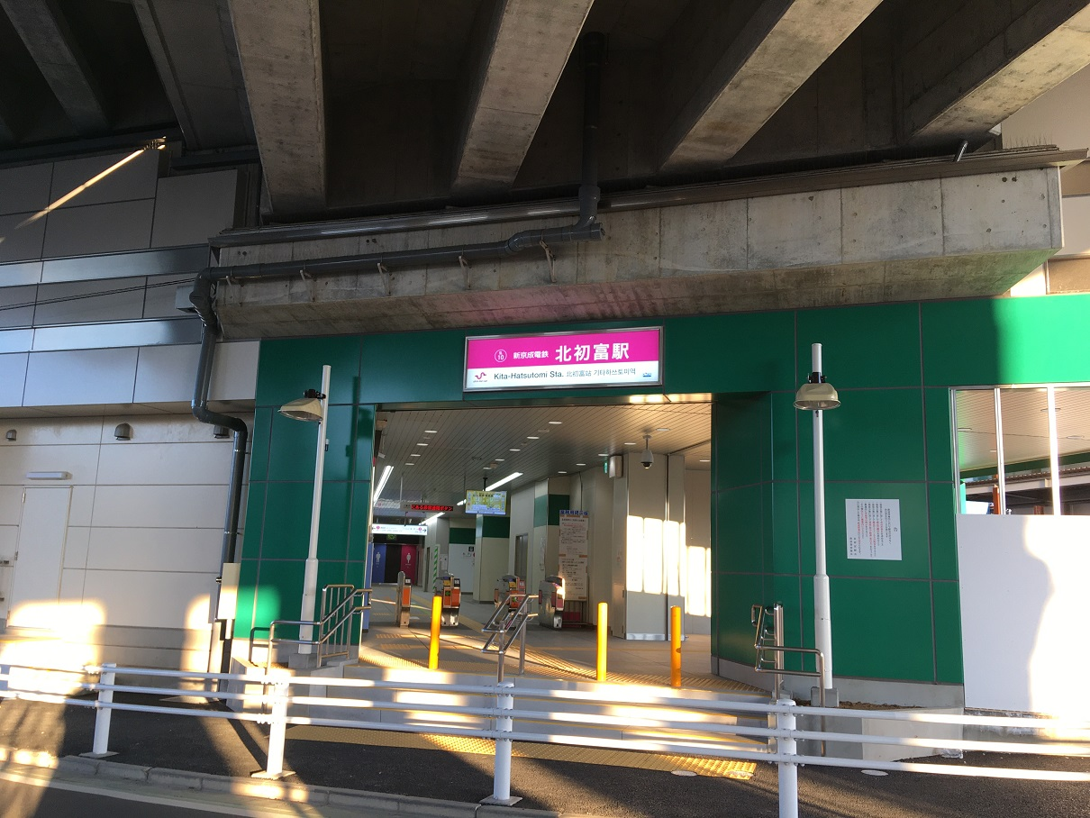 高架下にある駅舎入口